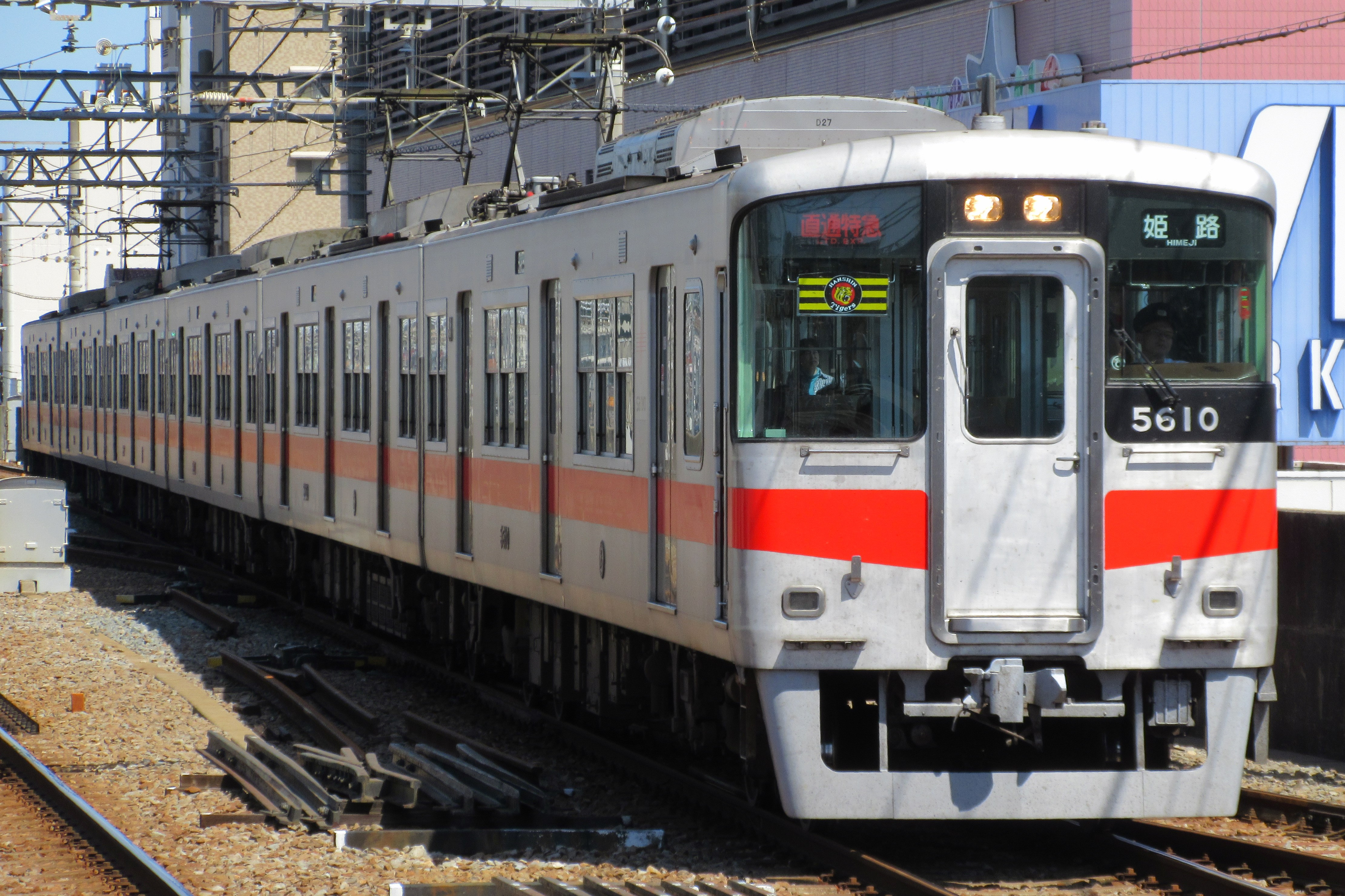 山陽電鉄5610(明石駅にて)